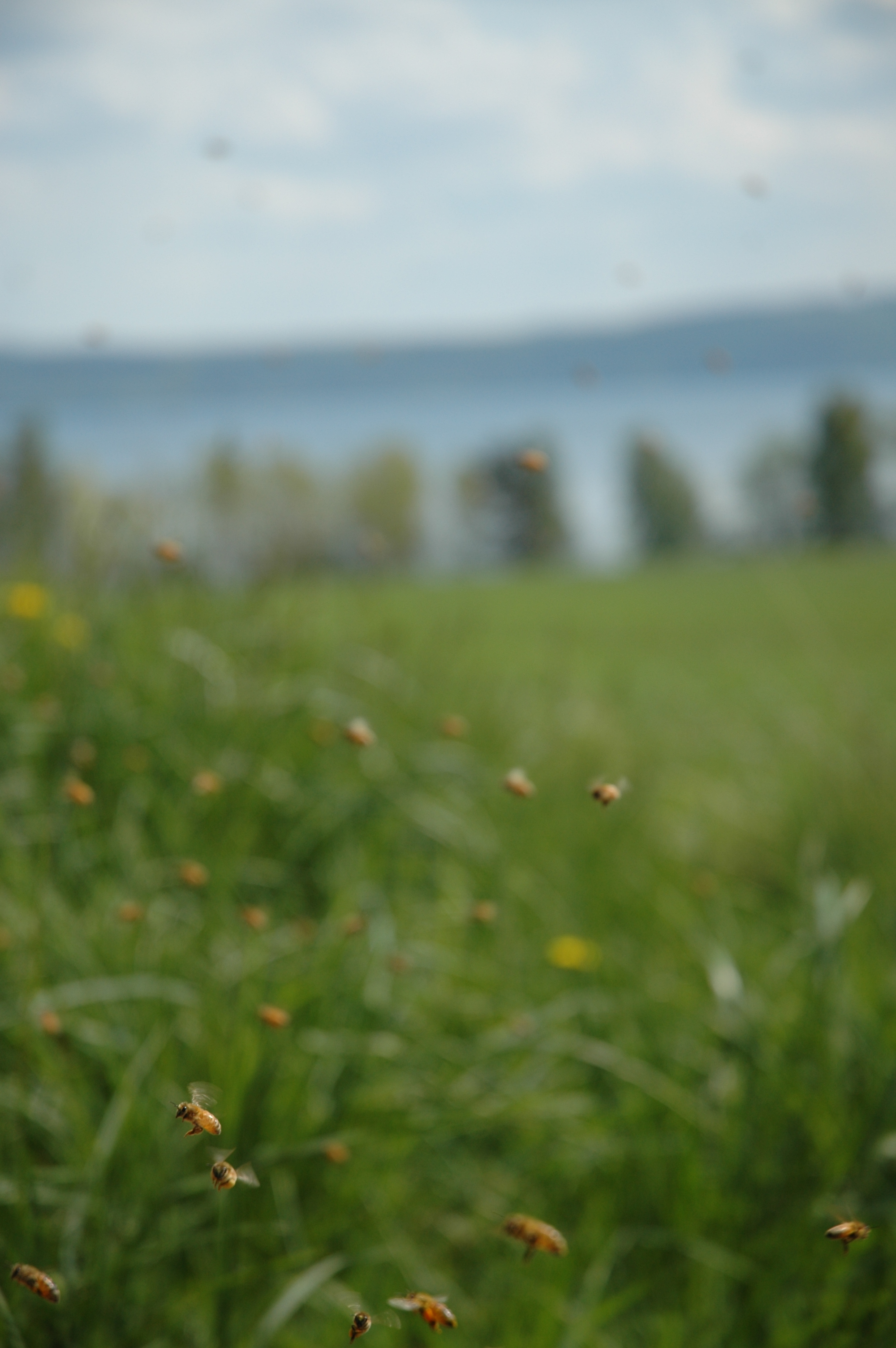 Bi som flyger